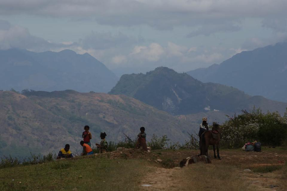 Letefoho